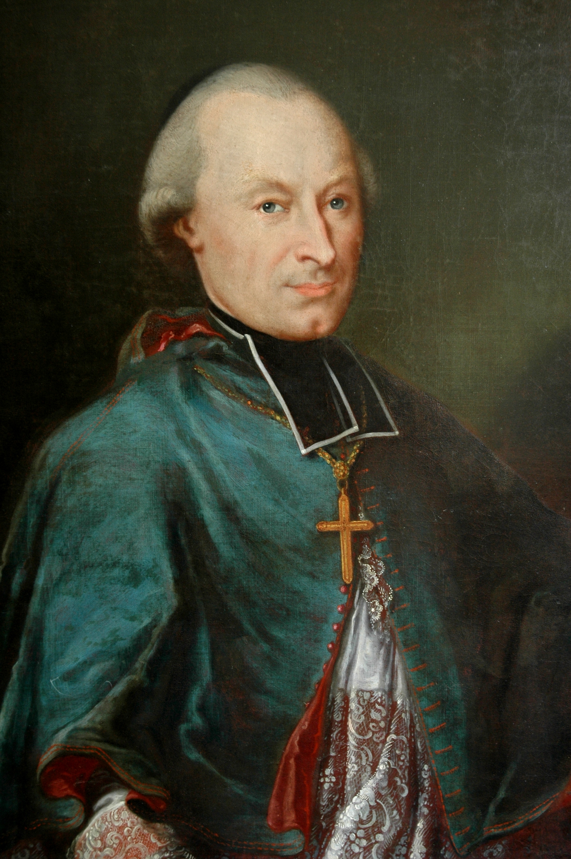 Porrentruy Hotel des Halles, Portrait de Jean-Baptiste Joseph Gobel, Evêque de Lydda (1772), évêque suffragant pour la Haute-Alsace (1776), puis évêque constitutionnel de Paris (1791)